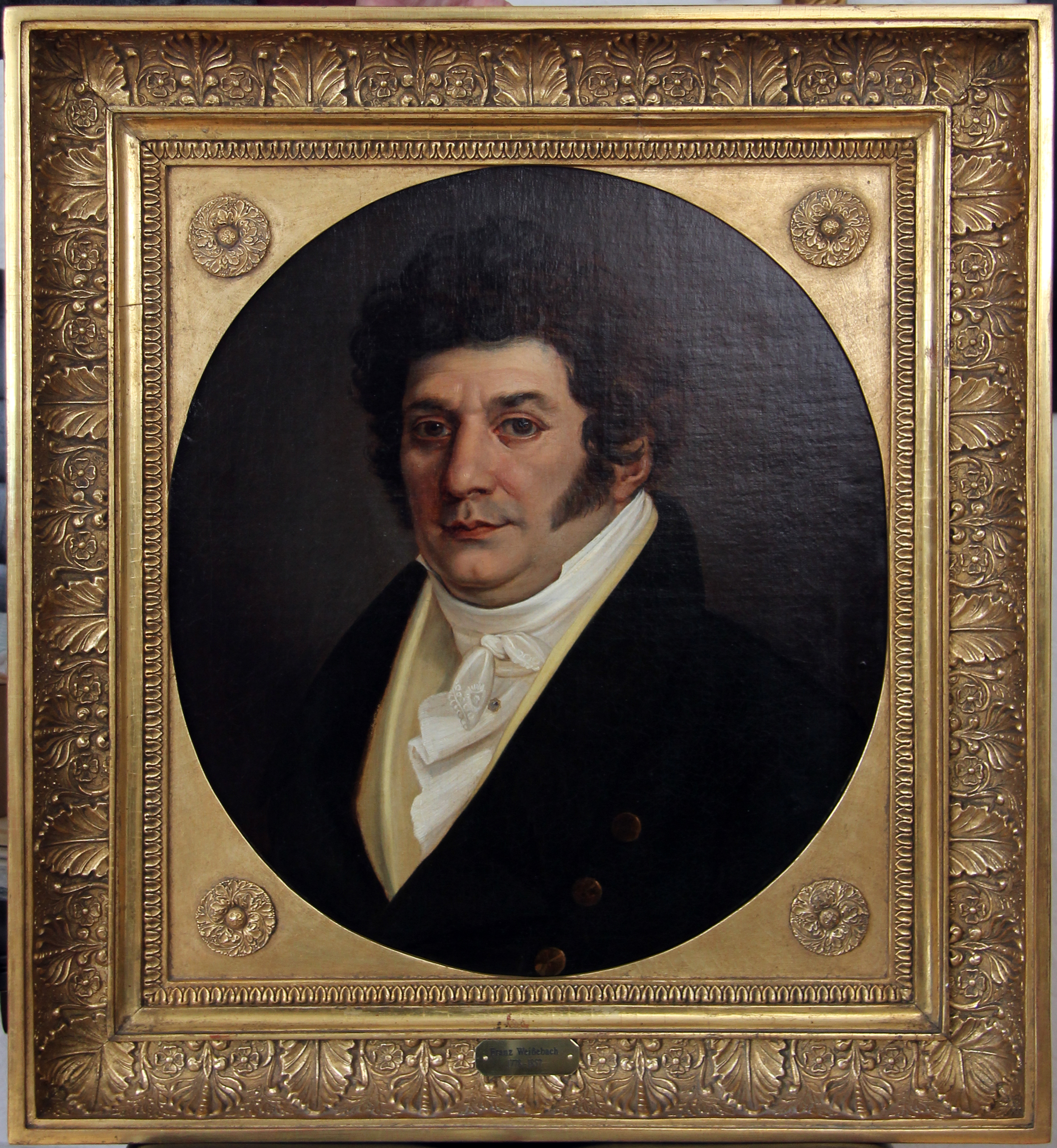 Franz Anton Weißebach (1778–1857), Gemälde von Johann Anton Ramboux